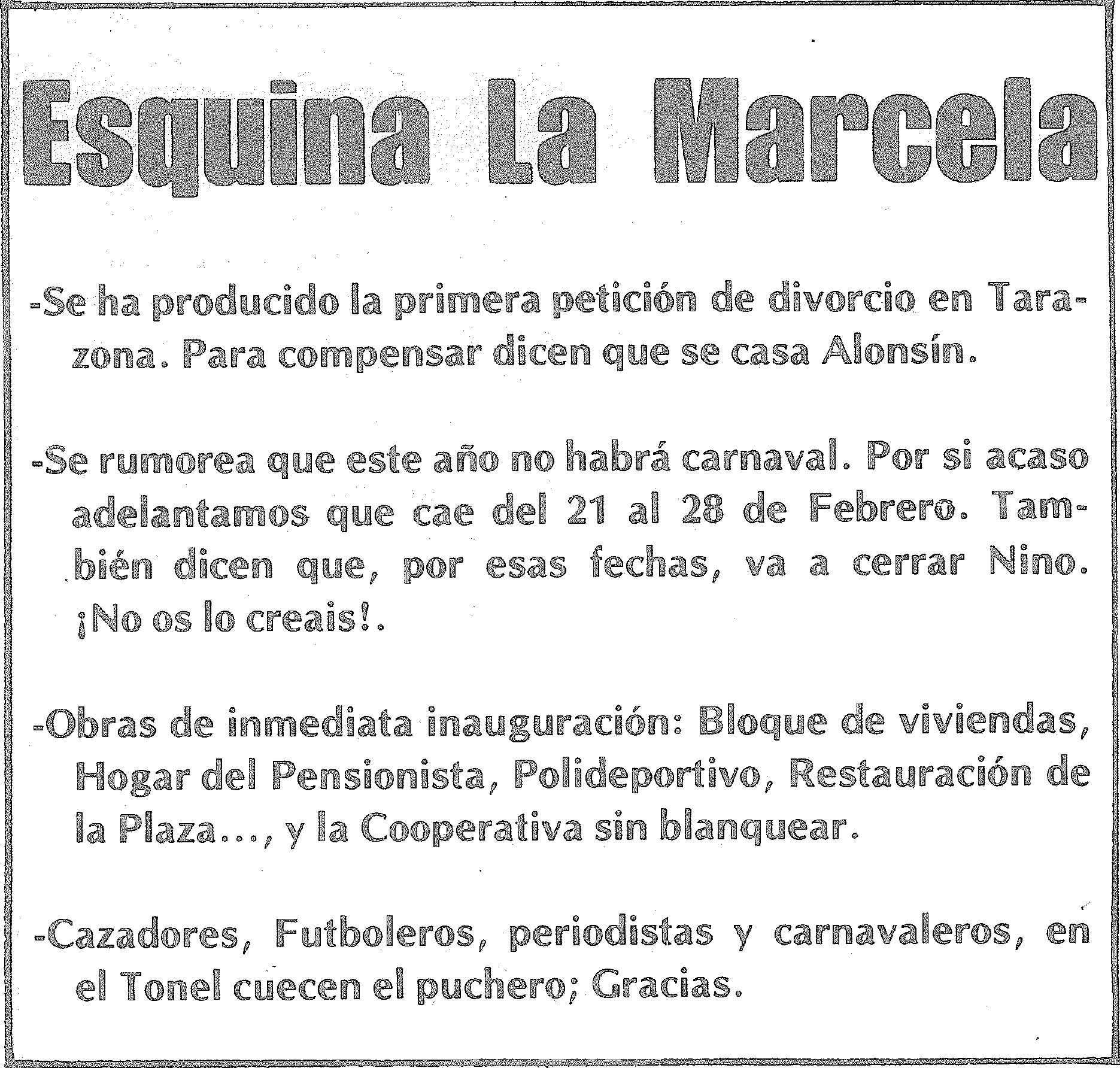 Marcela Corner